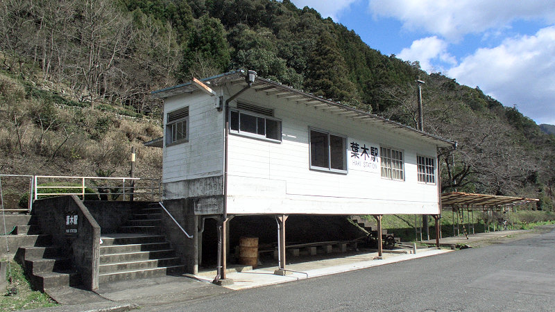 JR肥薩線葉木駅 駅舎 撮影者/著者/著作権保有者 : MK Products (本人がアップロード) 撮影日 : 2007/03/07 葉木駅用にアップロードした画像です。良い画像があれば別の画像に変えてください。